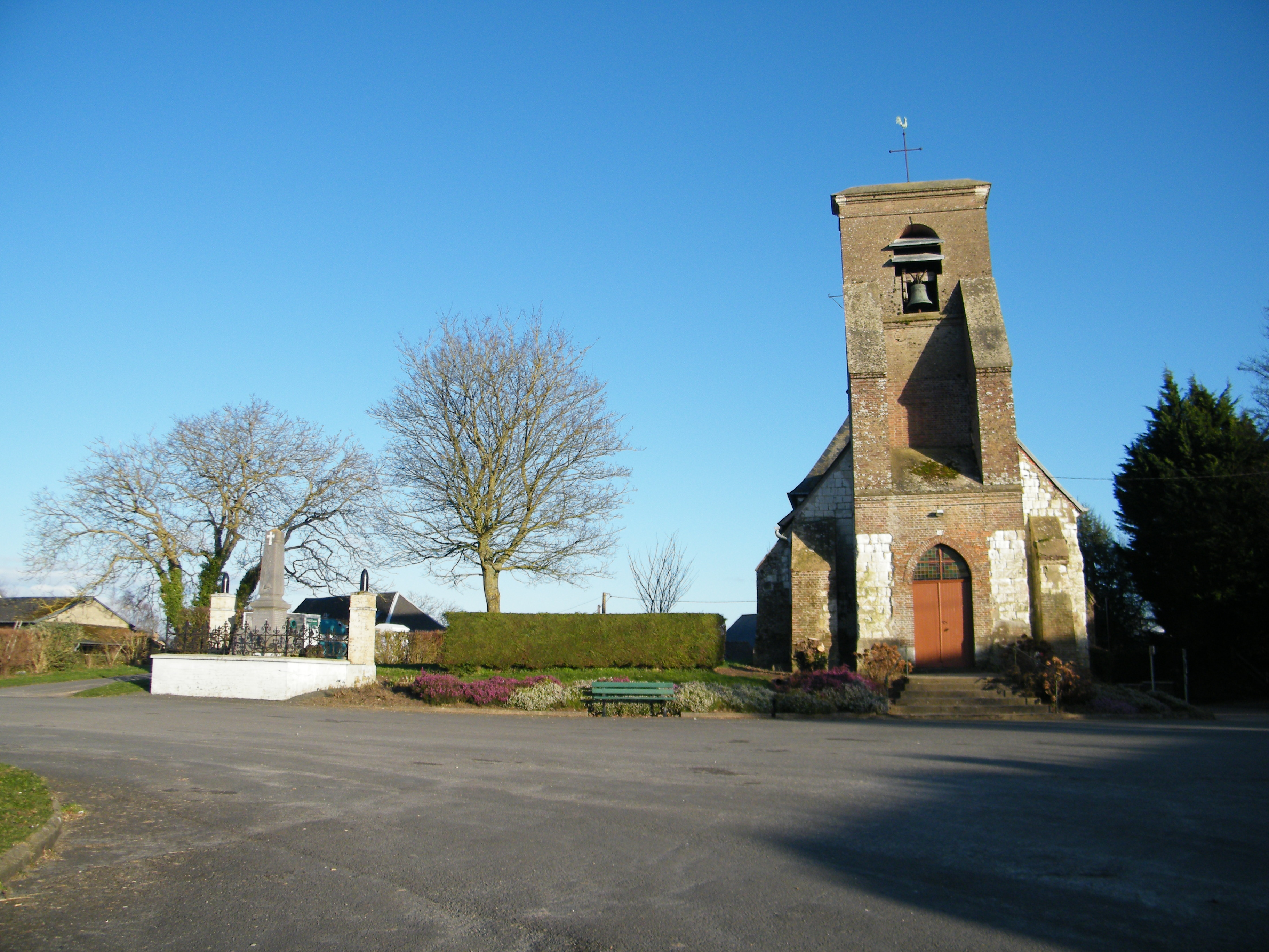 Monument aux morts pour la patrie et église - Saigneville.